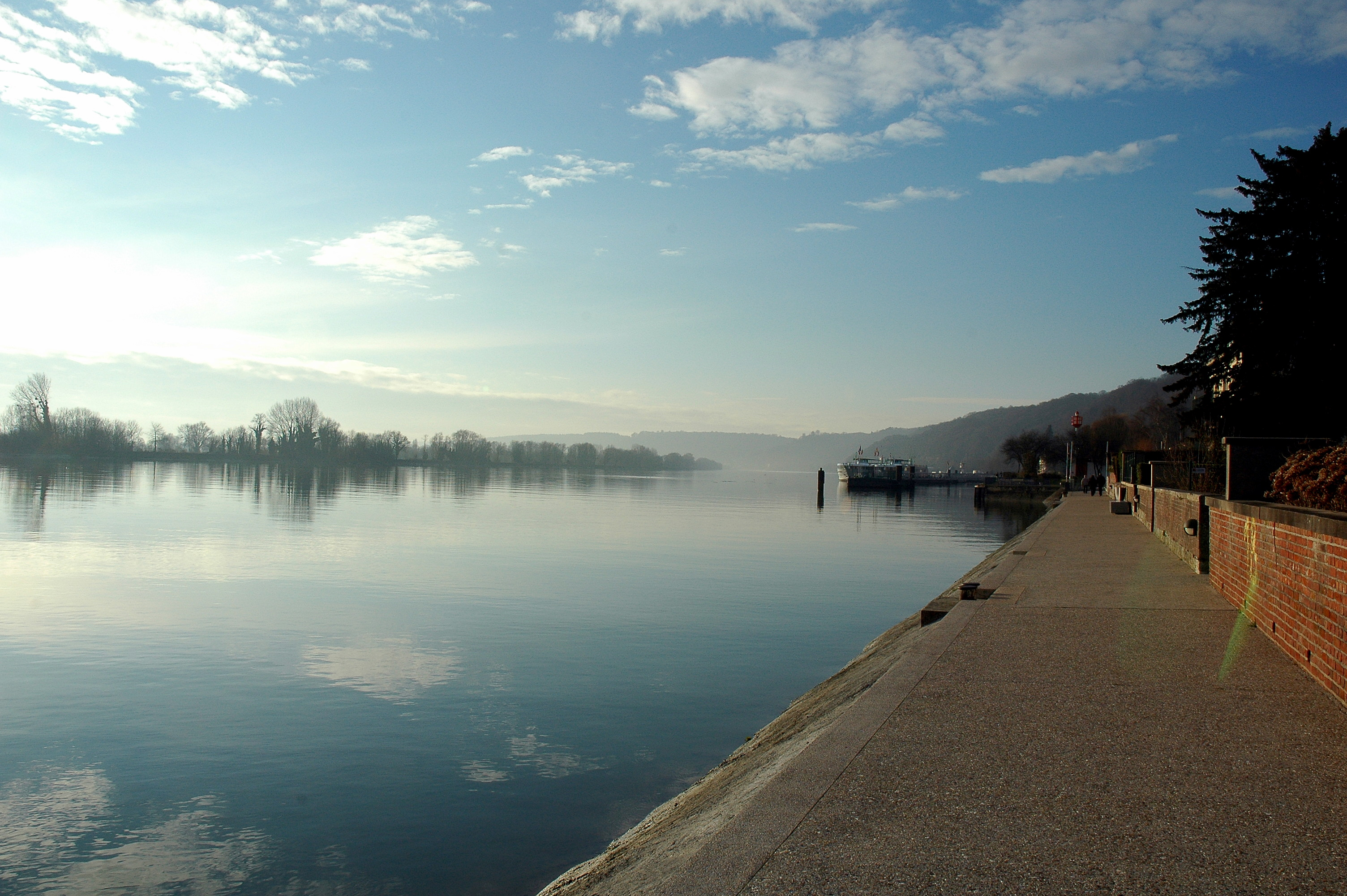 Caudebec-en-Caux (Seine-Maritime, France). La Seine.